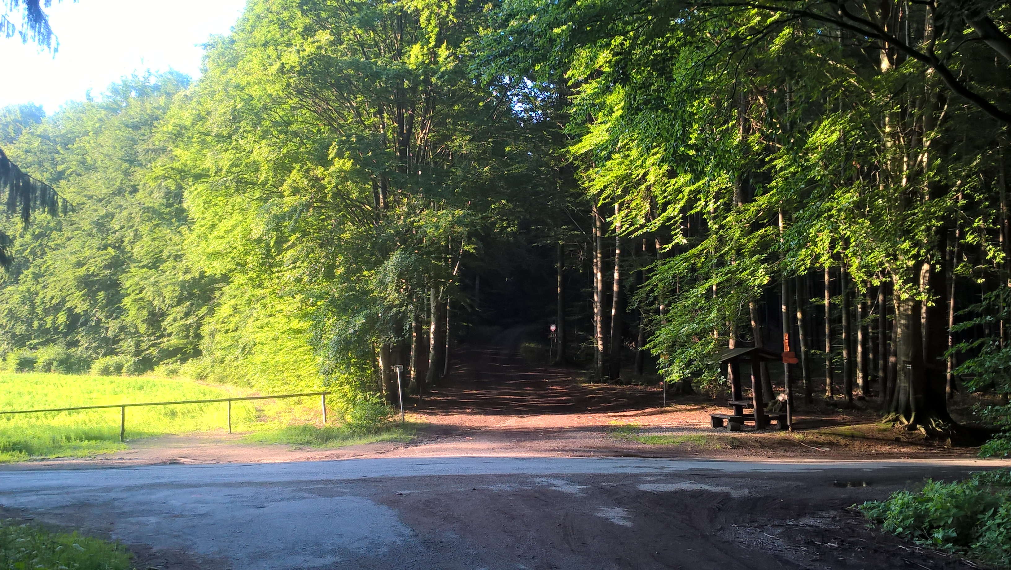 Orlovské lesy - rozcestí nad Novým Dvorem